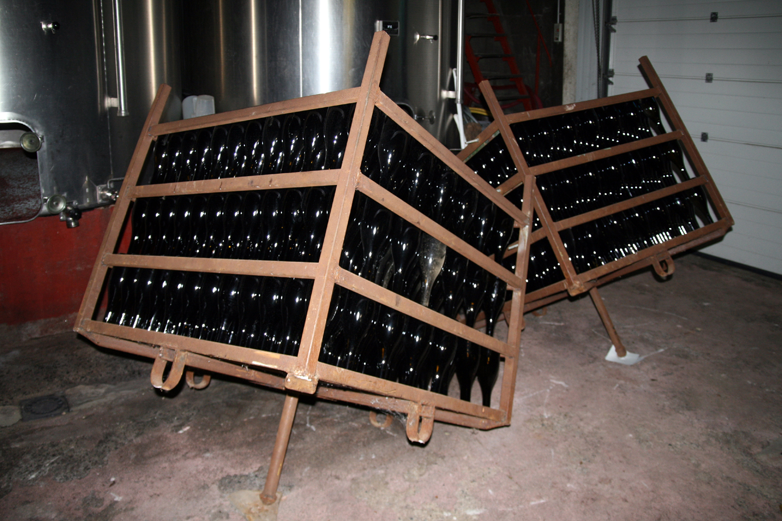 Méthode champenoise, remuage automatique sur Gyropalette